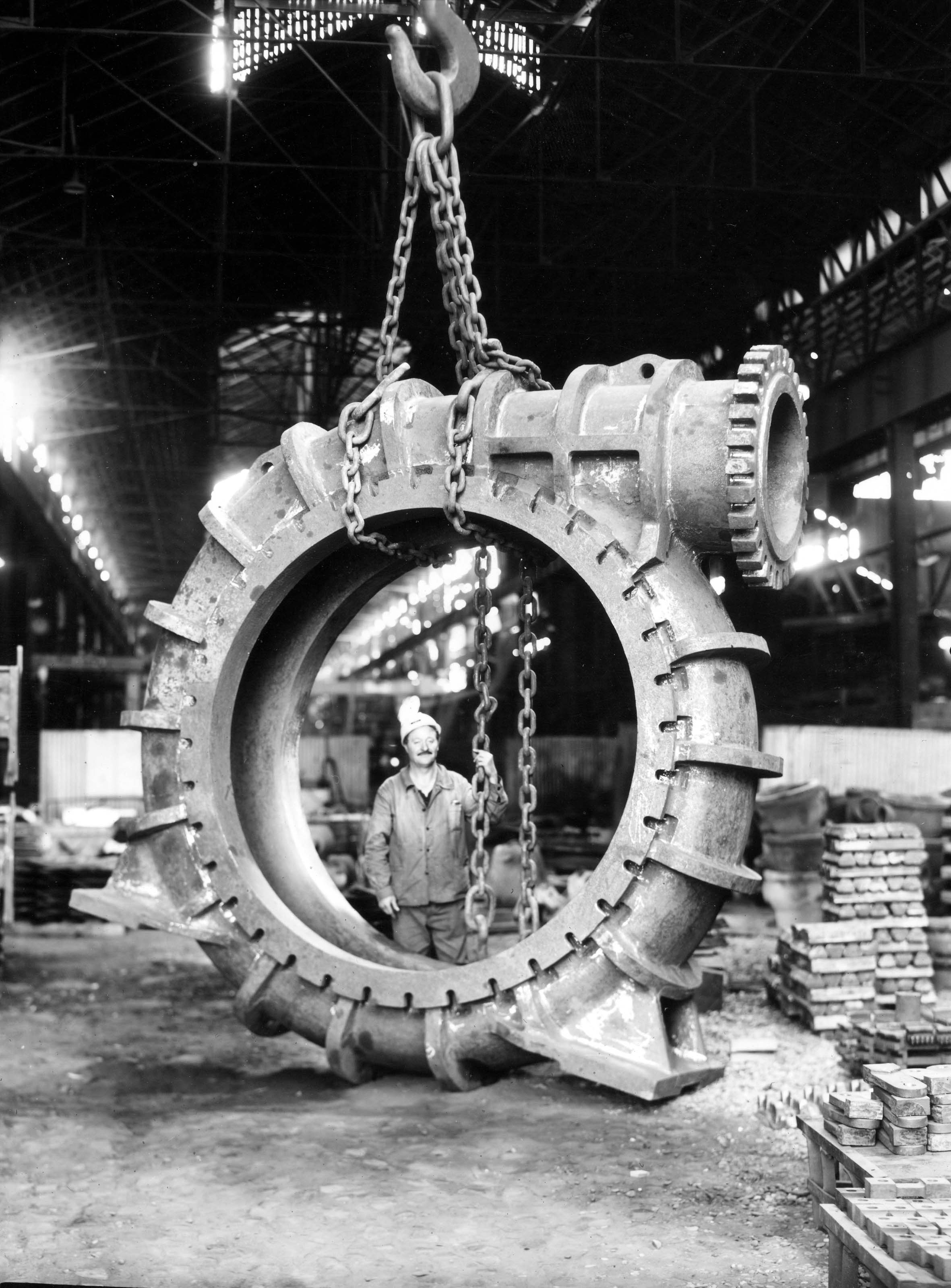 Vannes